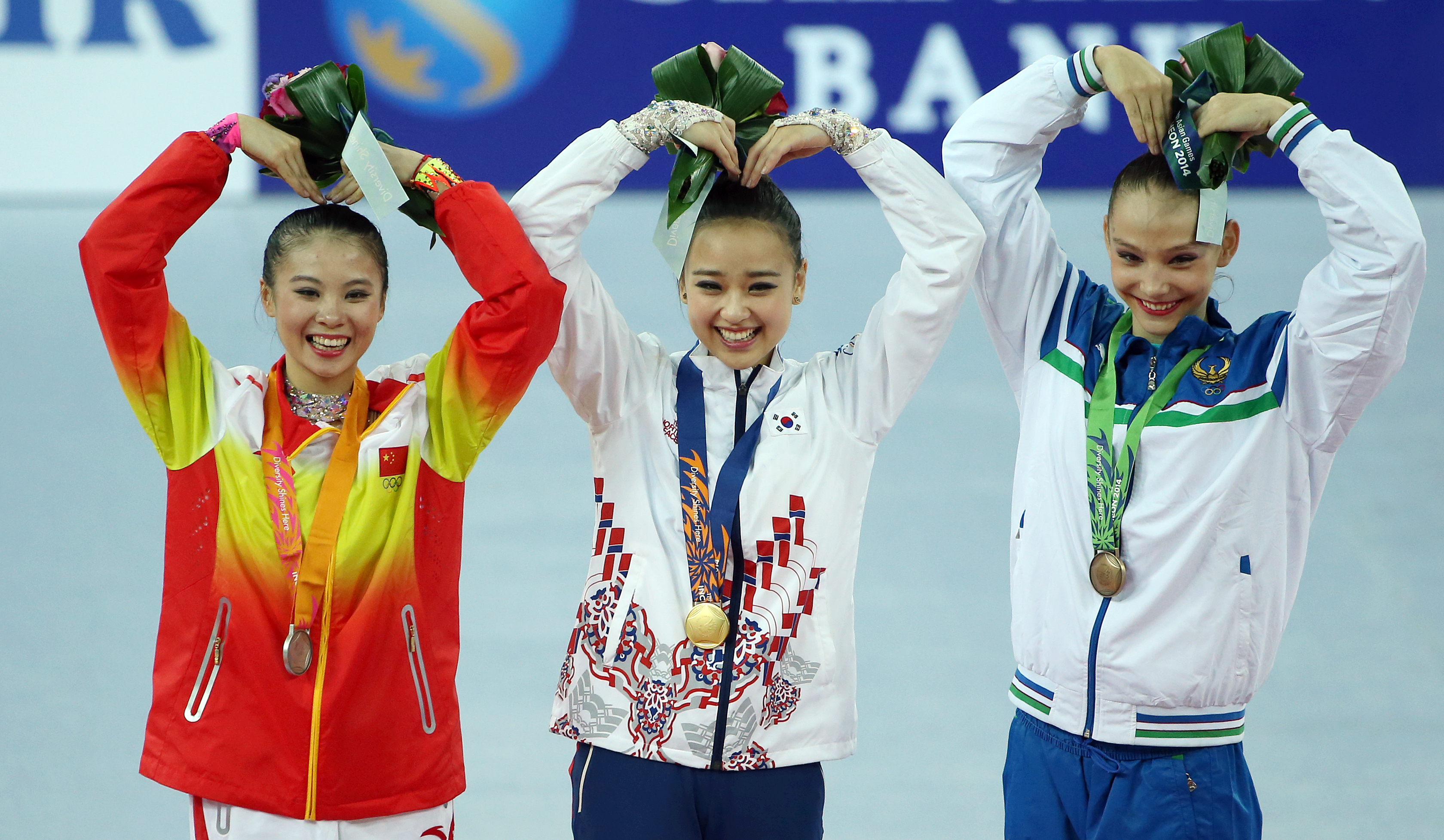 2014인천 아시아경기대회리듬체조손연재가 2일 인천시 남동체육관에서 열린 ‘2014 인천 아시아경기대회’ 리듬체조 개인전 결승에서 후프 연기를 펼치고 있다.2014-10-02남동체육관, 인천시문화체육관광부해외문화홍보원코리아넷전한